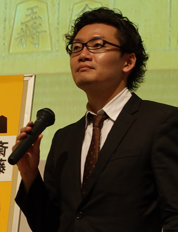 松尾歩八段。2018年10月2日、第66期王座戦五番勝負第3局 大盤解説会にて。